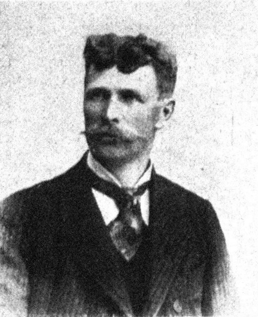 Österreichischer Politiker, Reichsratswahl 1907, Name siehe Dateiname